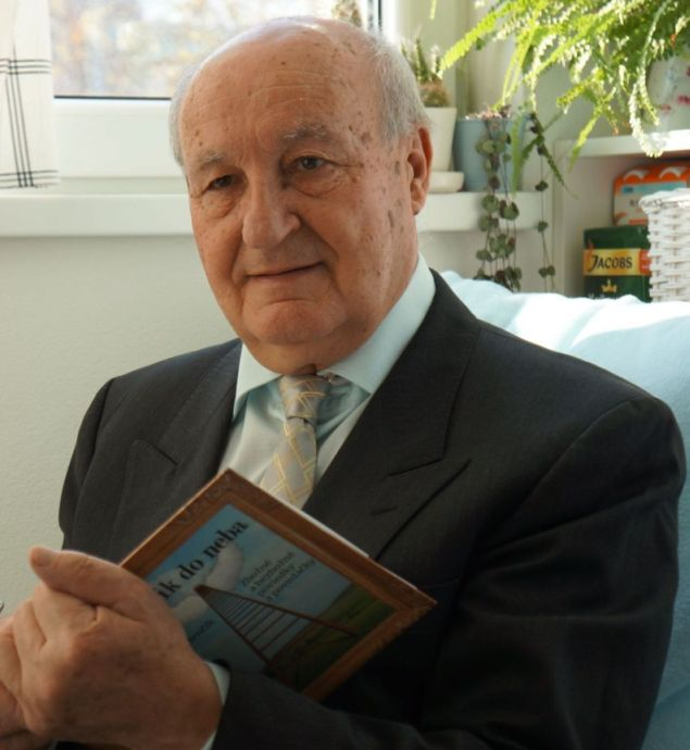 Emil Benčík, portrét